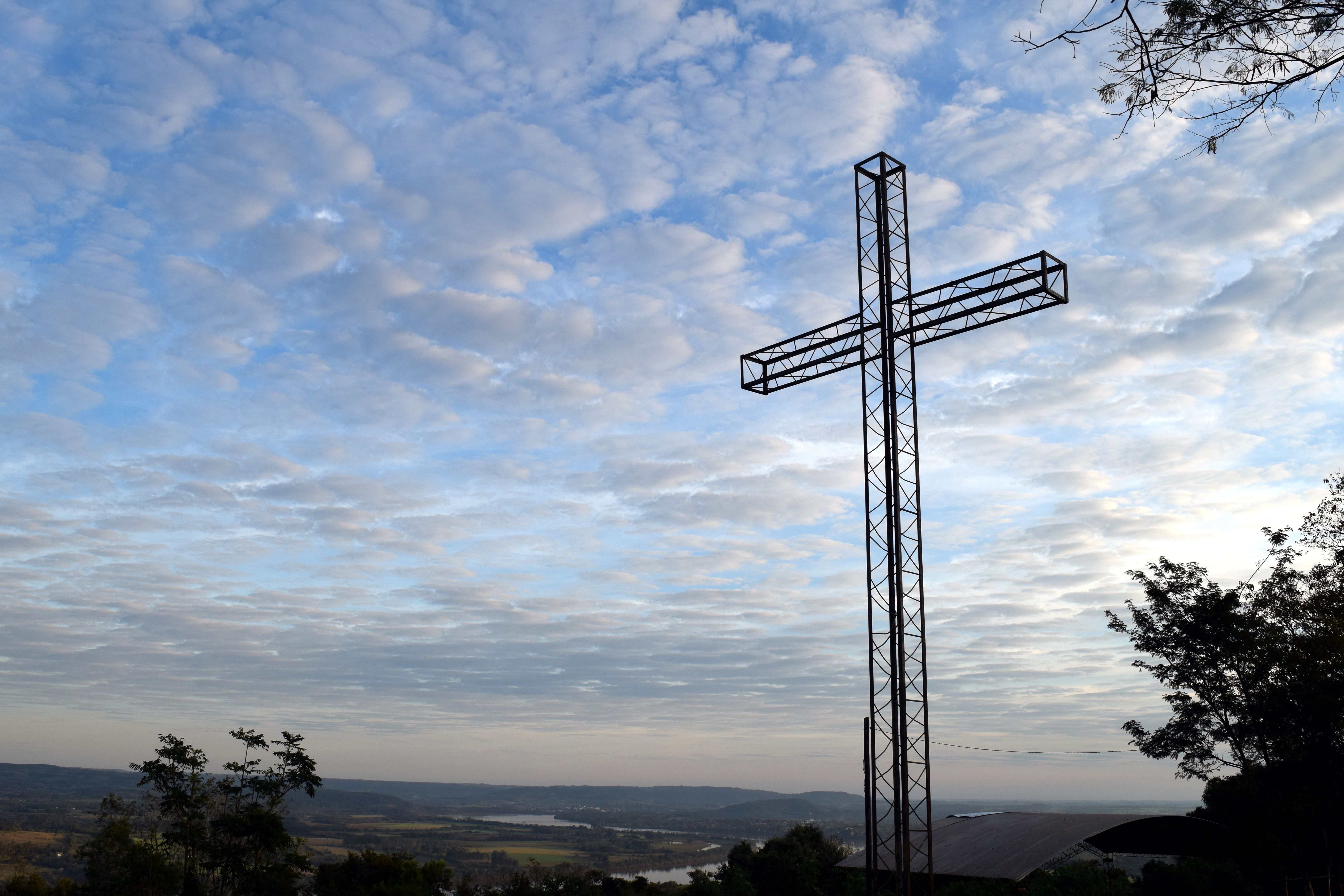 Vista de la cruz del Cerro Monje, lugar de peregrinación en San Javier, Misiones, Argentina.